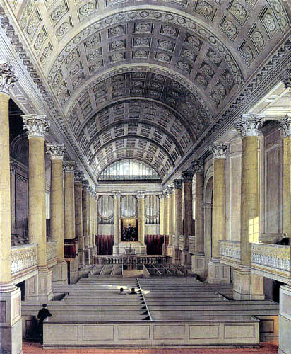 В старом берлинском соборе